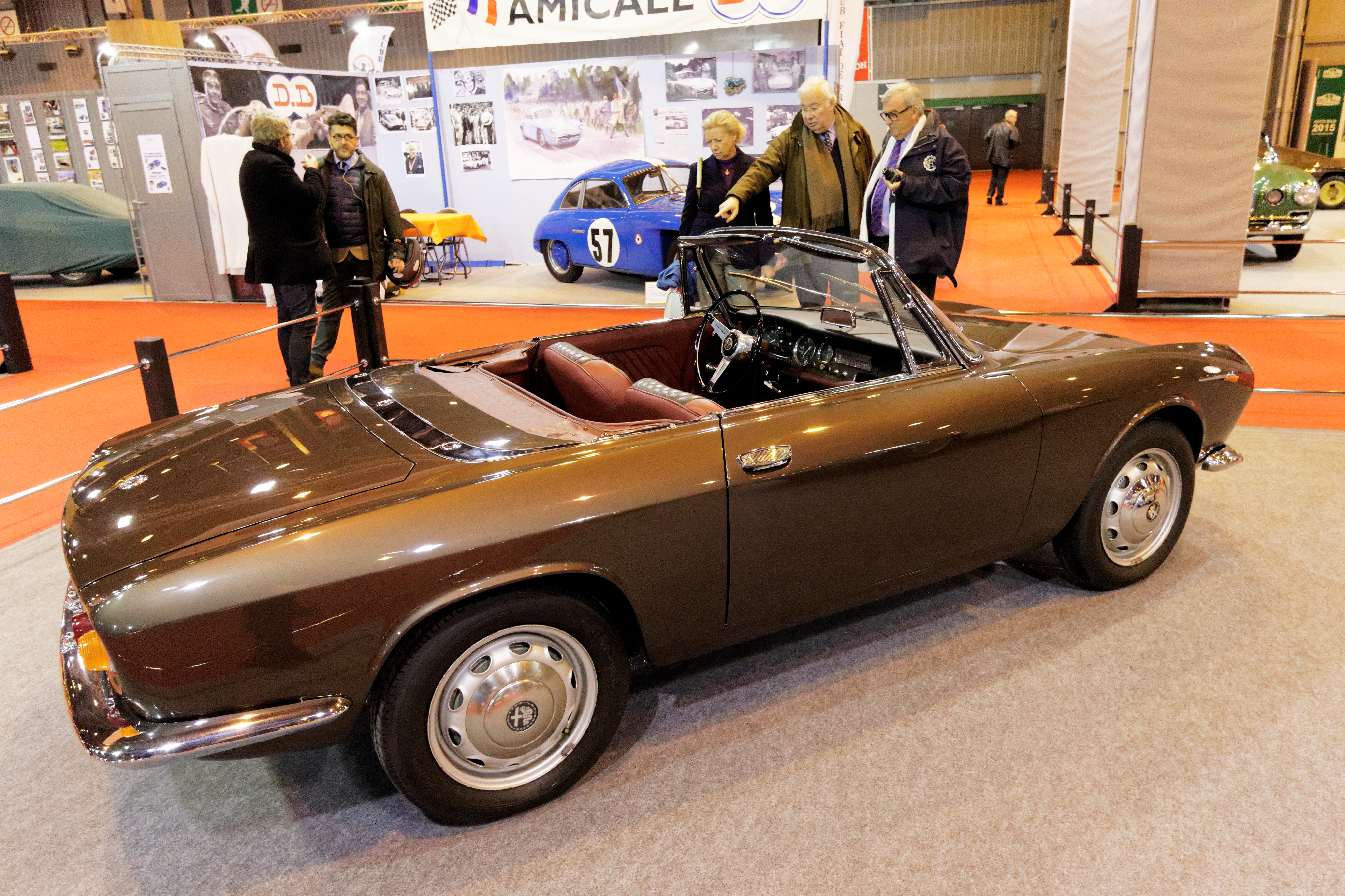 Une des voiture présentée lors du salon Rétromobile de Paris 2015